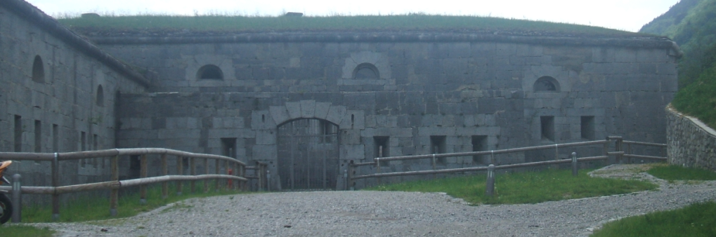 Fortelarino2